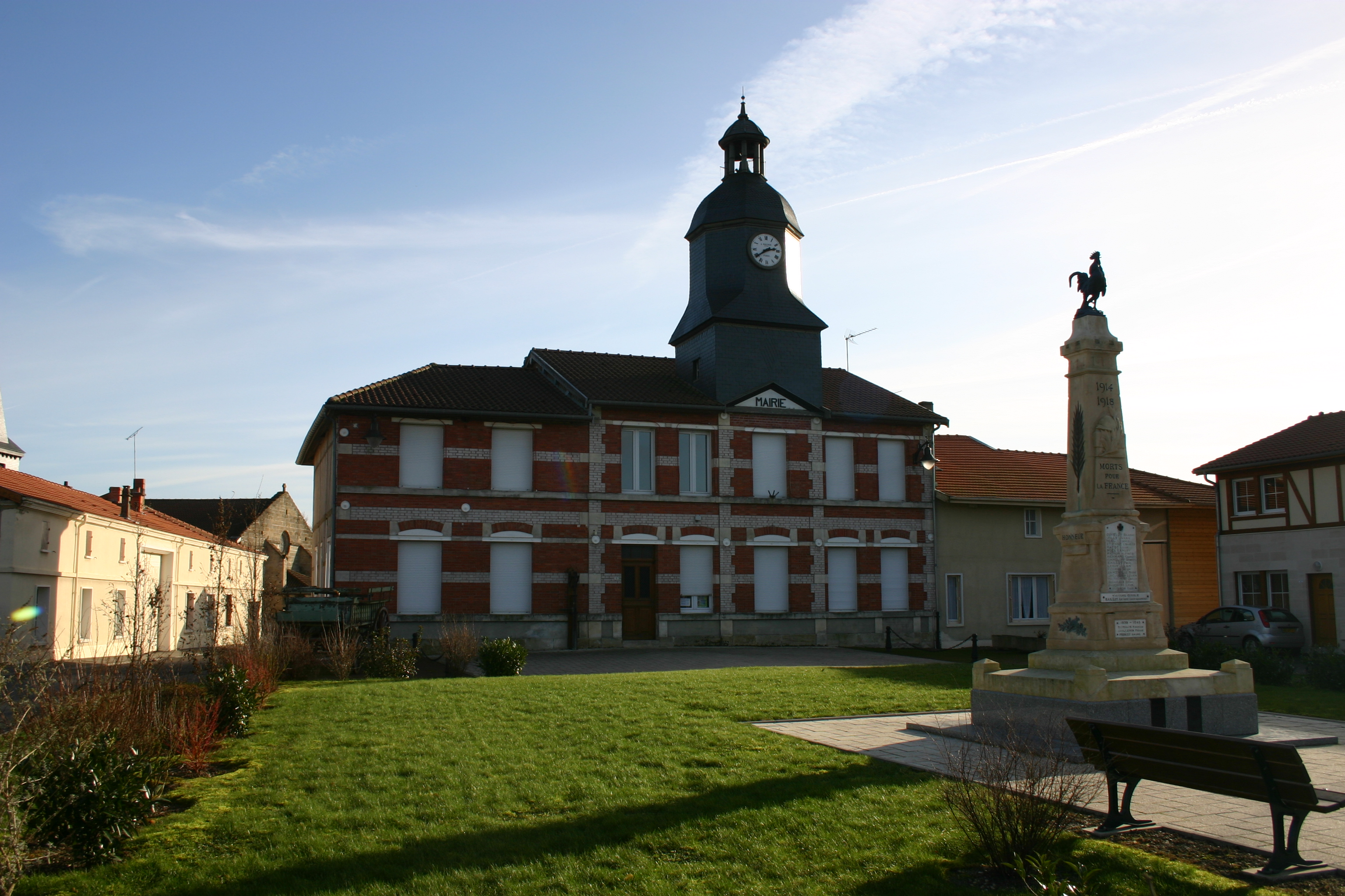 La place de la Mairie de Possesse (Marne)